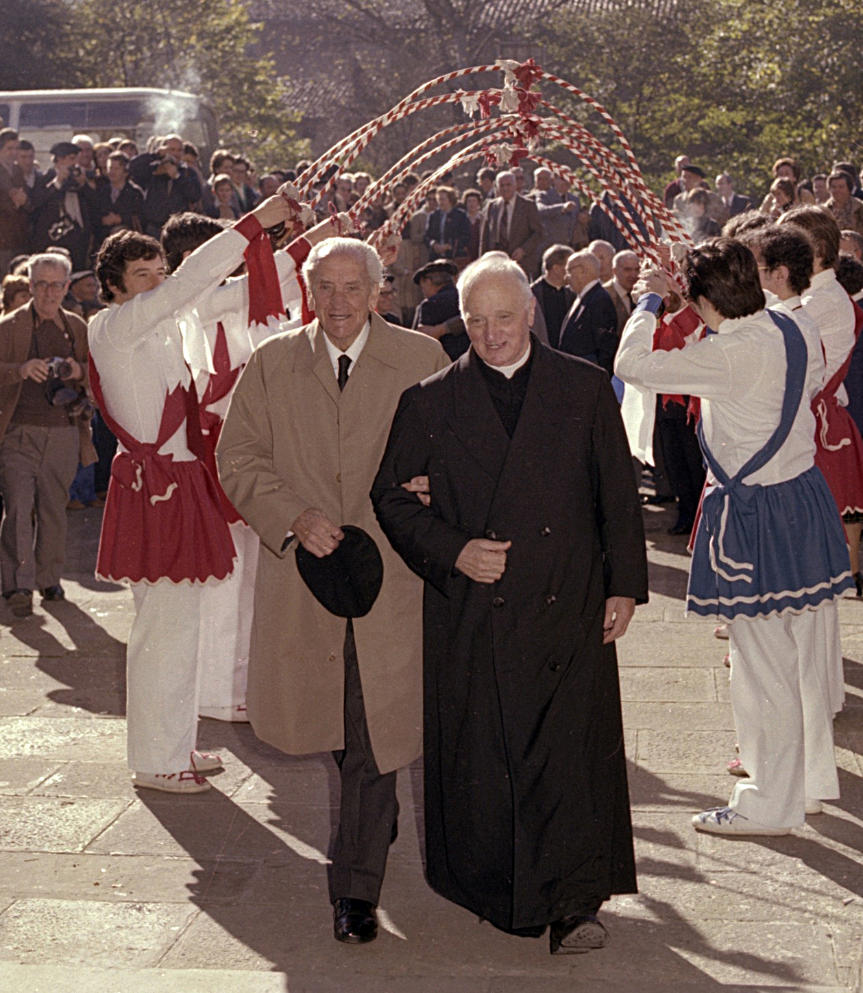 Manuel de Irujo eta Manuel Lekuona Unibertsitateko sarreran dantzariak atzean ageri direla, Aita Barandiarani eginiko omenaldian